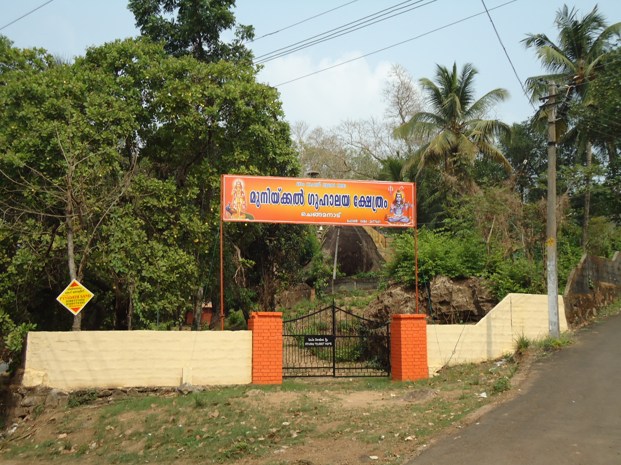 Munikkal Guhalaya Temple Chengamanadu